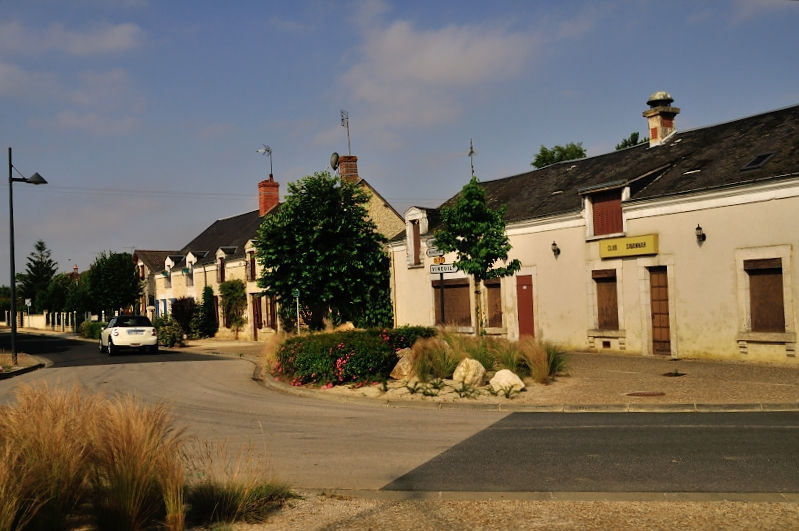 Villers-les-Ormes (Indre) - Le Bourg